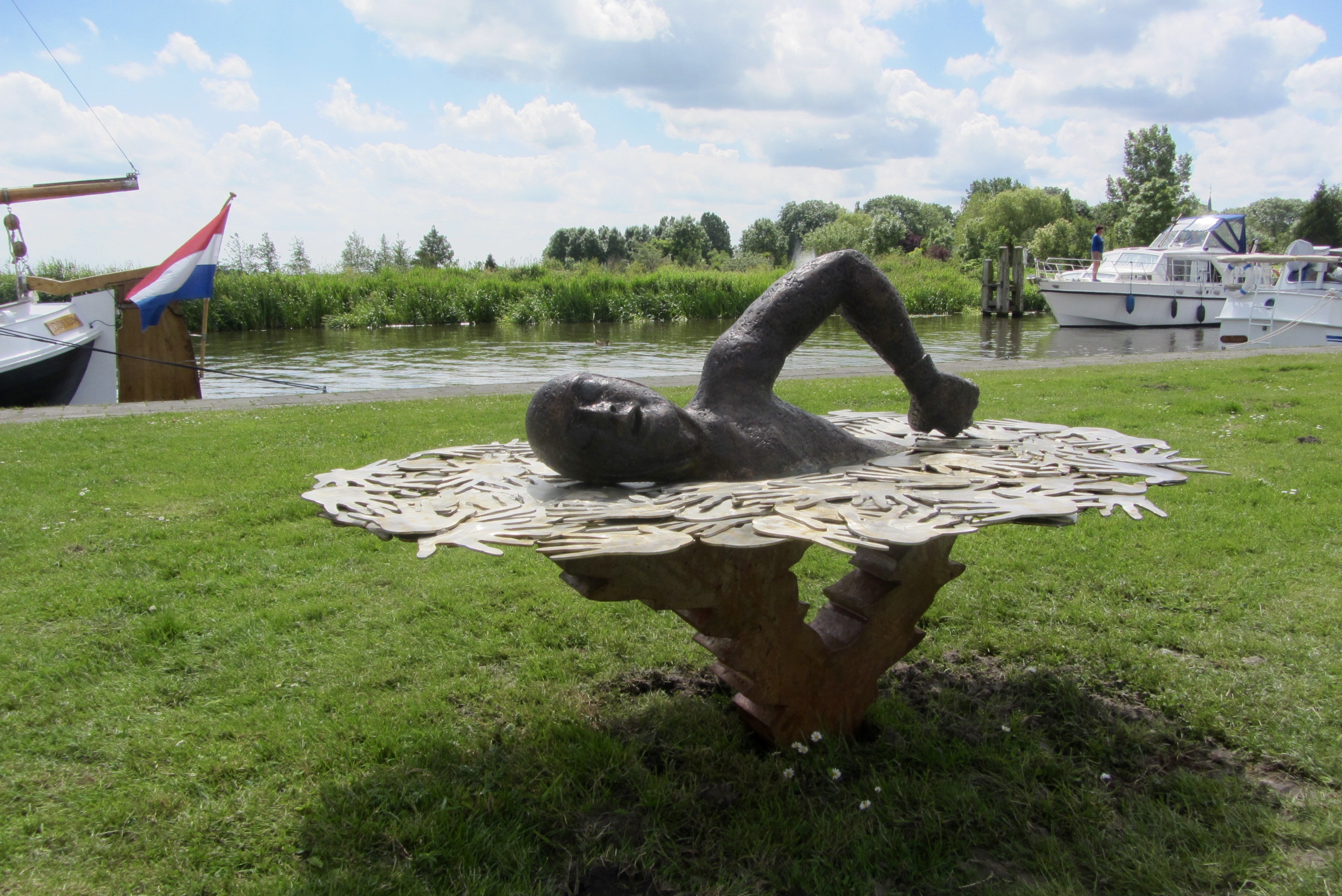 In Burdaard moest lange afstand zwemmer Maarten van der Weijden zijn poging om in 2018 de Elfstedentocht te zwemmen opgeven. Hij was te uitgeput om de laatste stad Dokkum nog te bereiken. Hij had toen al 163 kilometer gezwommen en 55 uur in het water doorgebracht. Hij begon op 18 augustus aan de tocht om zoveel mogelijk geld op te halen voor onderzoek naar kanker. Er werd uiteindelijk een bedrag van 5 miljoen euro’s ingezameld. Op initiatief van dorpsbewoners en met de toezegging van kunstenaar Hans Jouta om het beeld kosteloos te maken, werd dit eerbetoon aan de moedige zwemmer gerealiseerd.